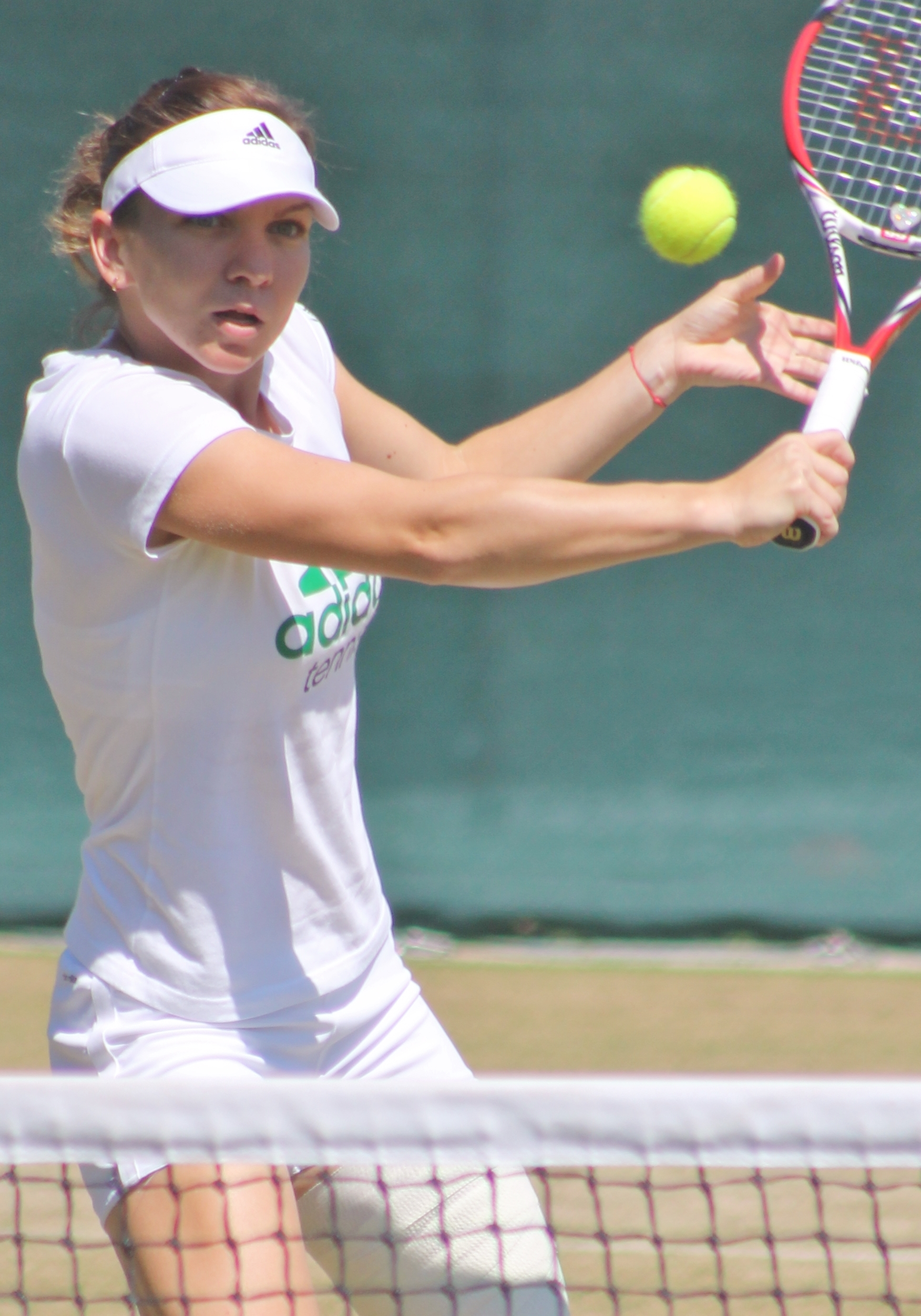 Halep WM14 (10)